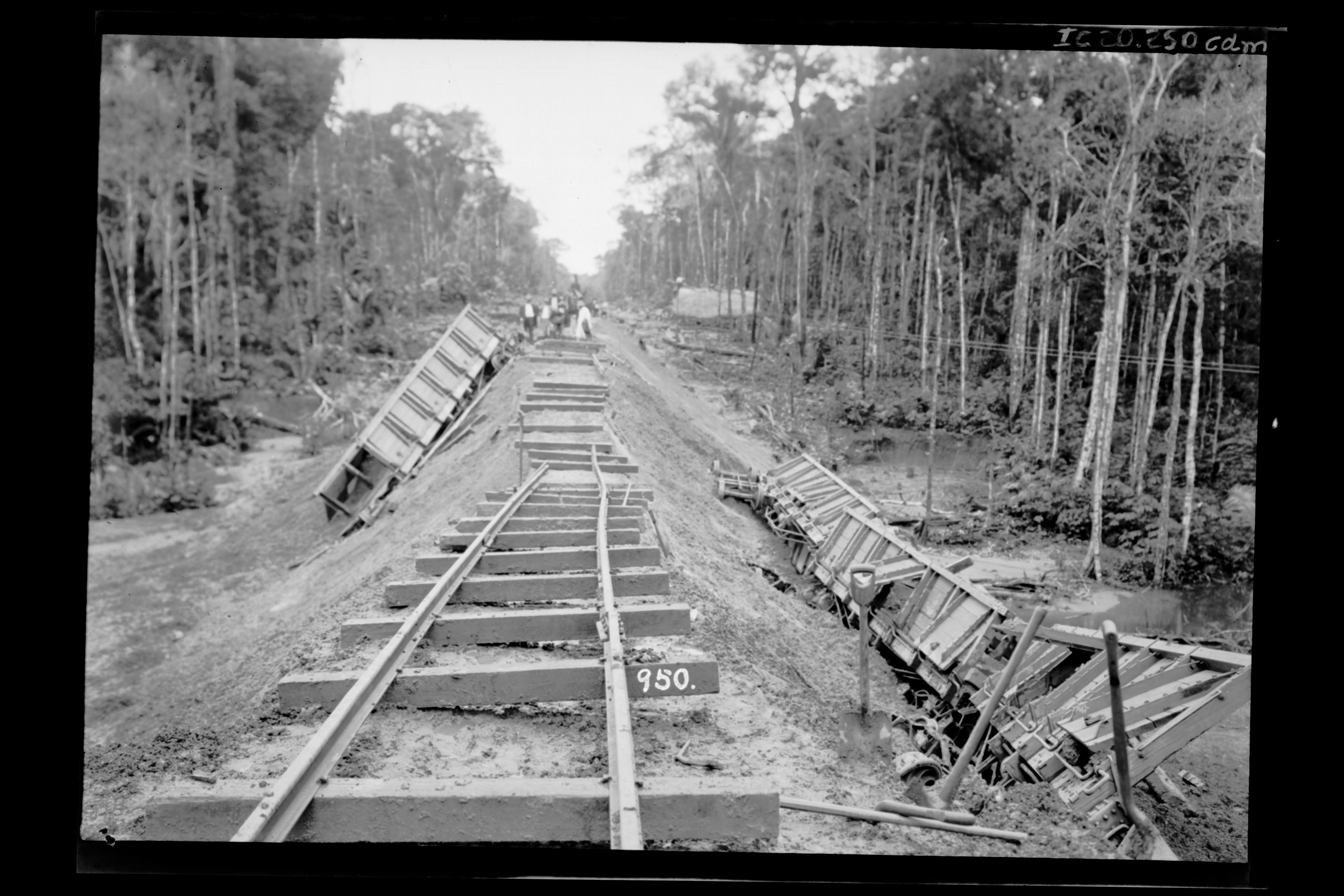 Obra que integra o acervo do Museu Paulista da USP. Coleção Dana Merrill.